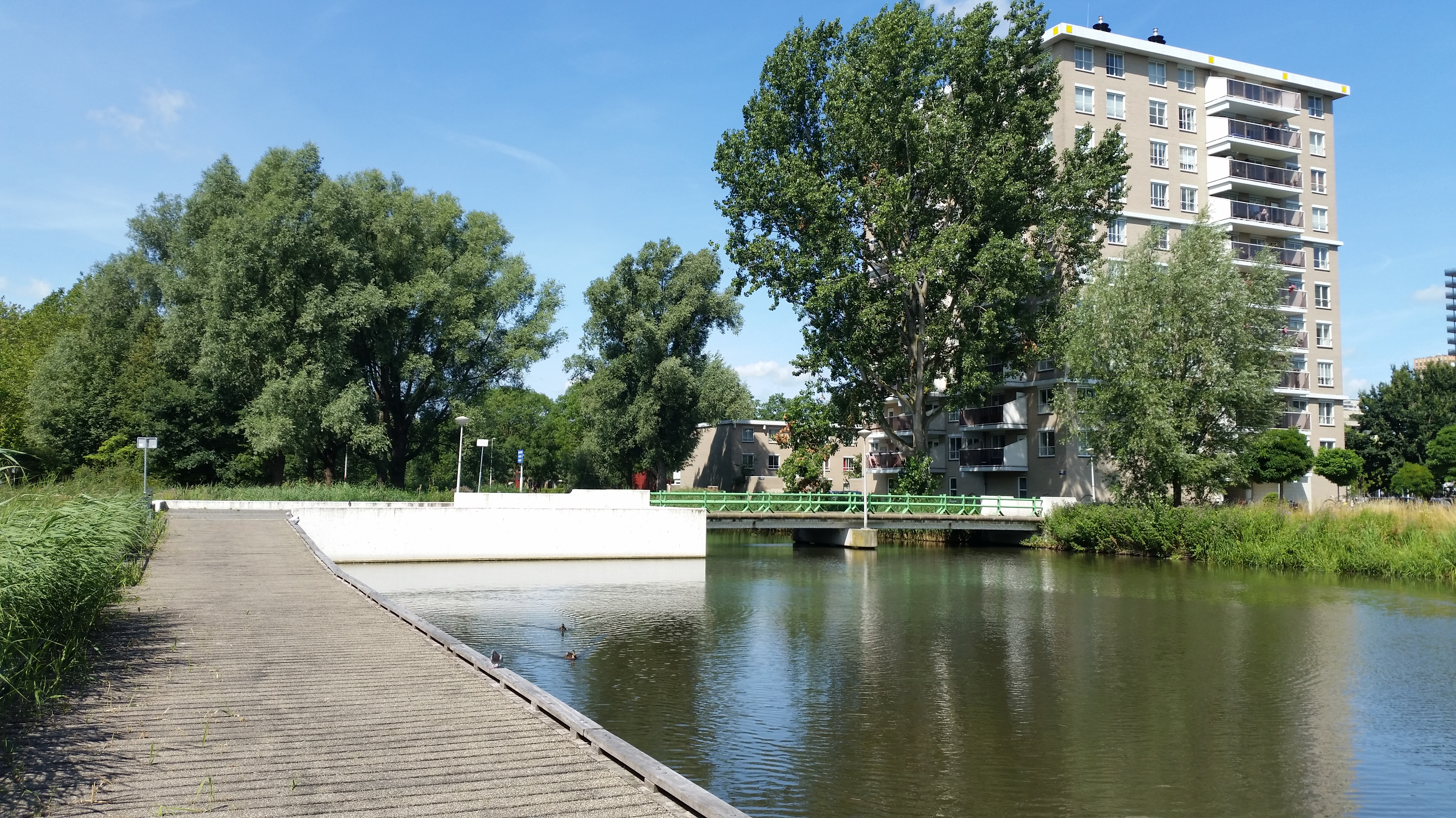 Zijaanzicht met steiger van Brug 1802 (in Amsterdam)